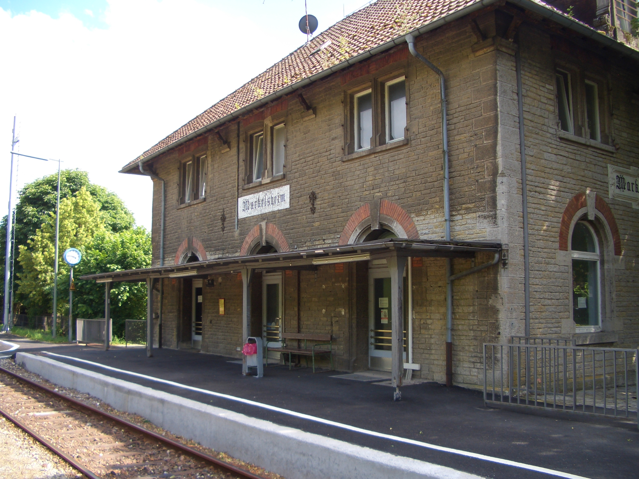 Markelsheimer Bahnhof, Bahnsteig 1